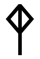 ing bindrune ("lantern rune")